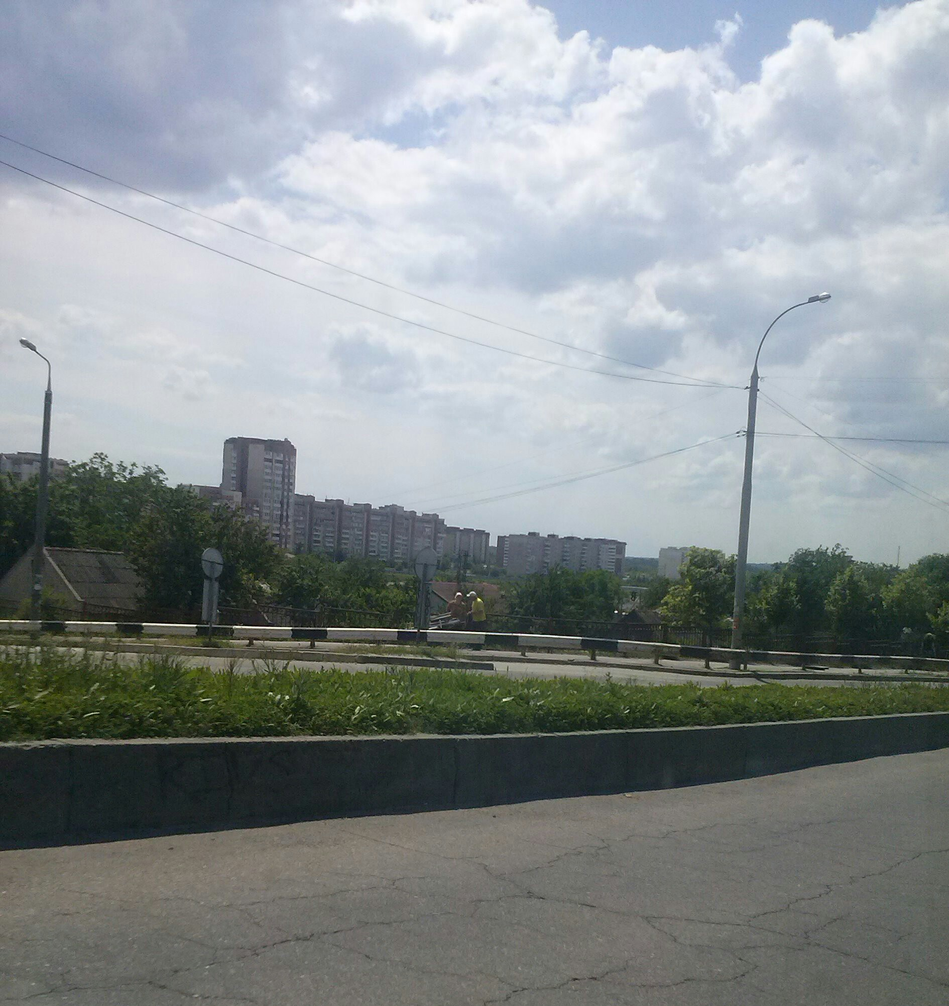 Вид на Південний мікрорайон. Запоріжжя